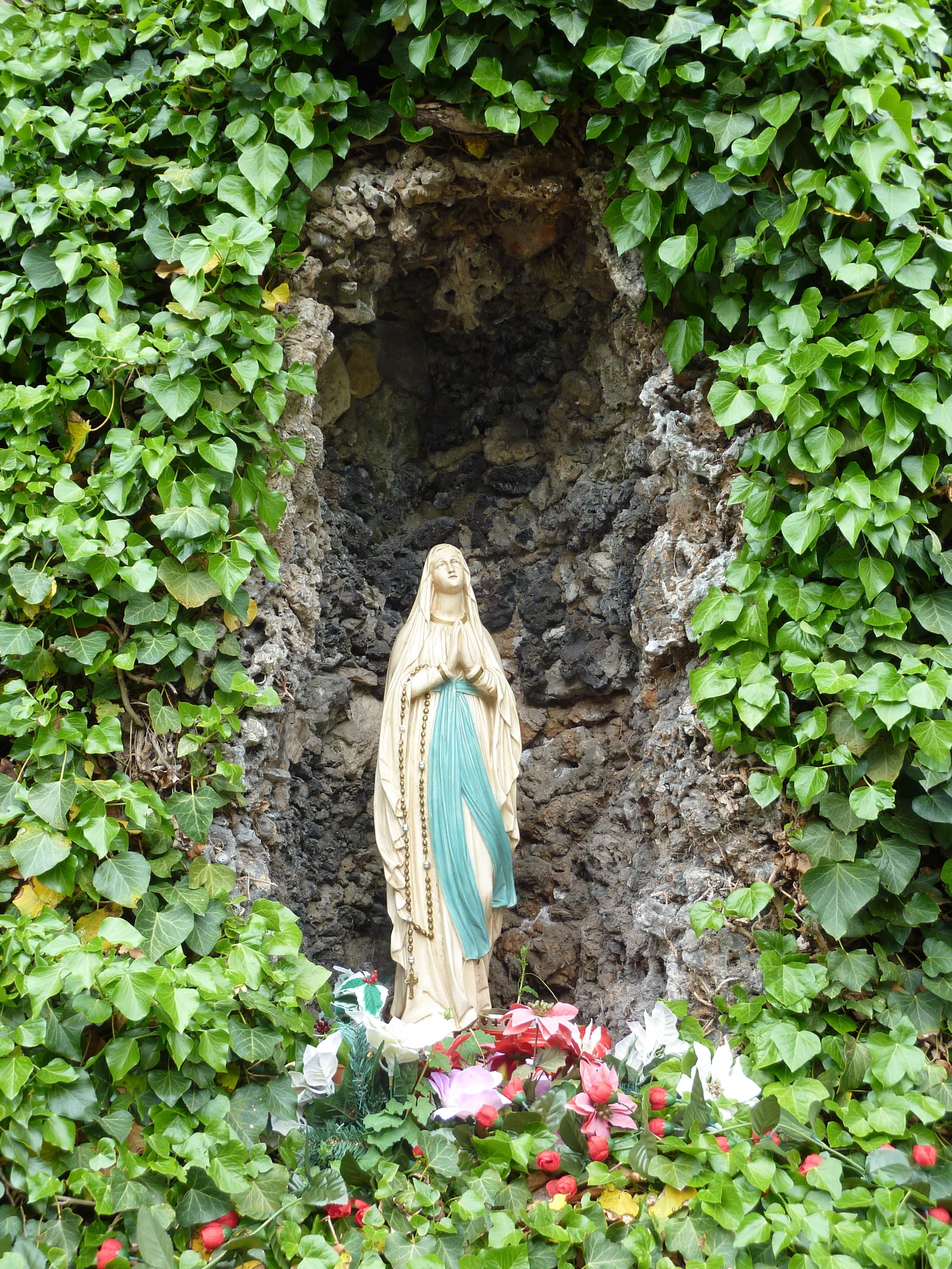 Die katholische Herz-Jesu-Kirche im Stadtteil Fechenheim in Frankfurt am Main. Madonnenfigur an der äußeren Südwestecke des Kirchenschiffs.